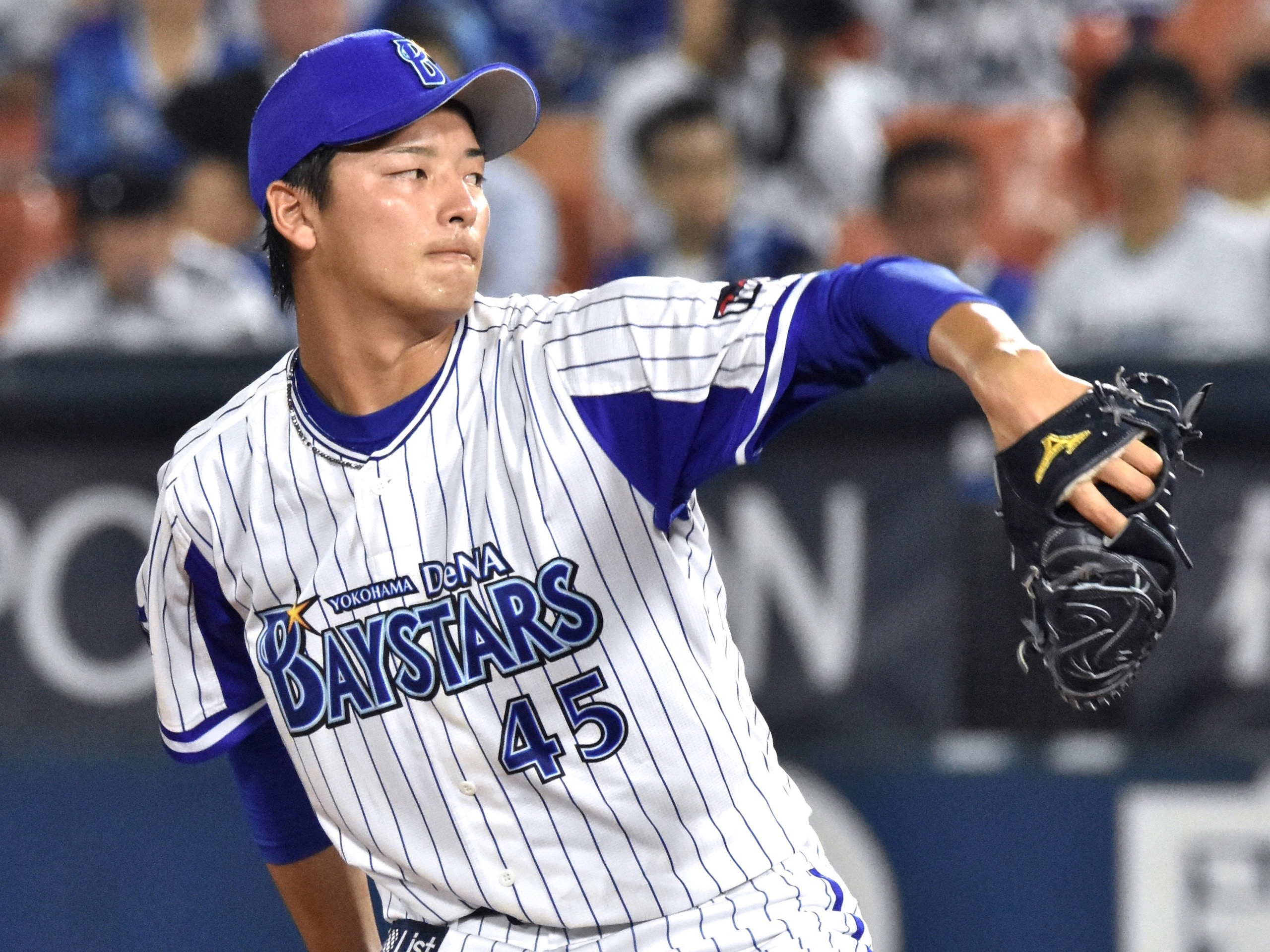 綾部翔（横浜DeNAベイスターズ）2017年10月3日、横浜スタジアムにて撮影